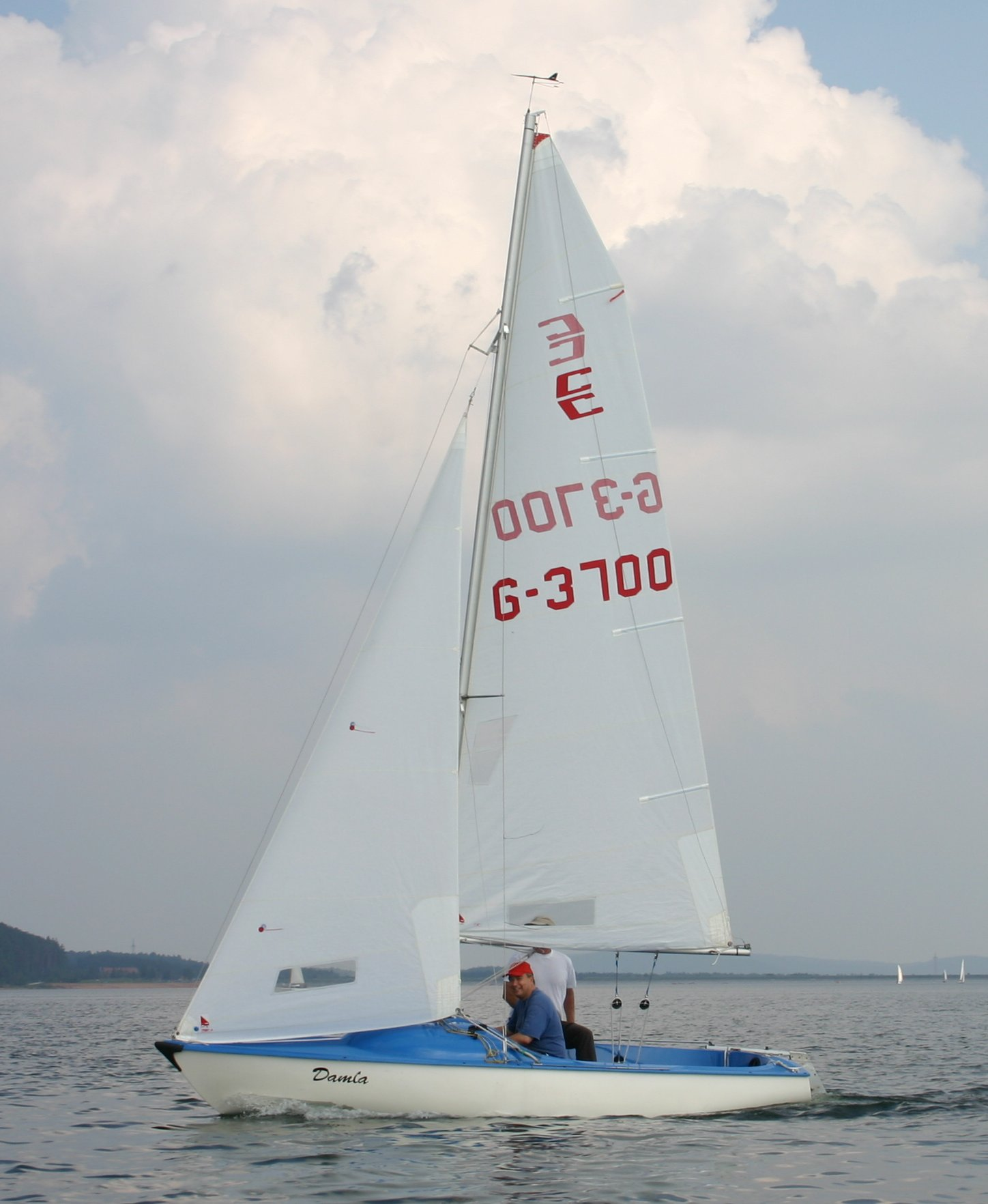 Conger-Jolle